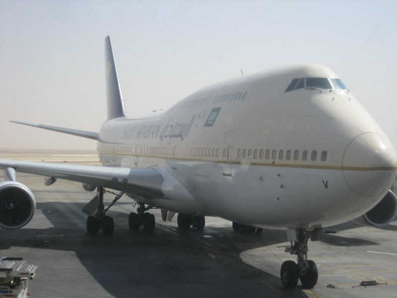 Saudi Arabian Airlines B747-400 at Riyadh King Khalid International Airport.